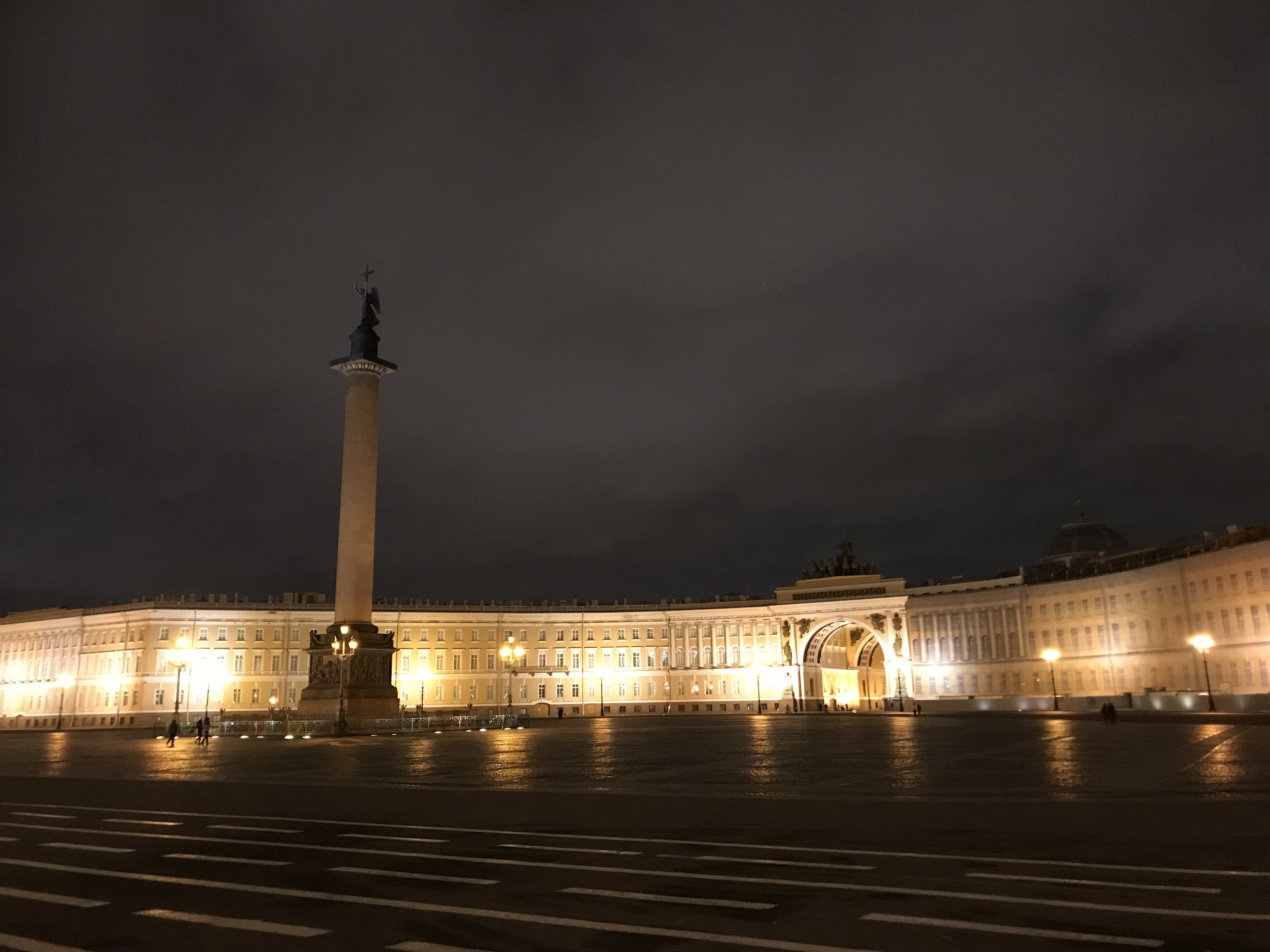 Дворцовая площадь - Дворцовый округ - Центральный район - Санкт-Петербург - Россия